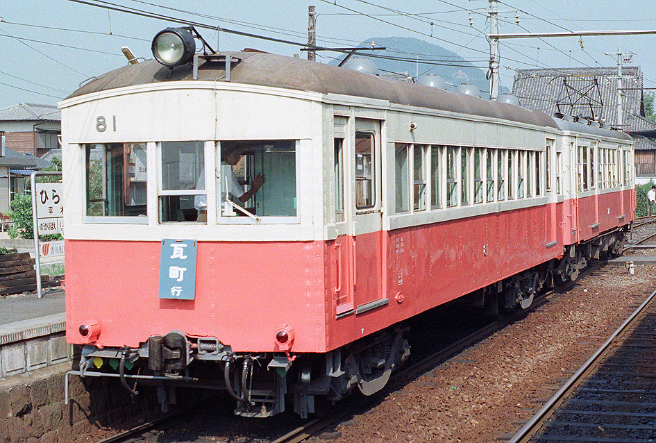 高松琴平電鉄 80形81（後は70形72）